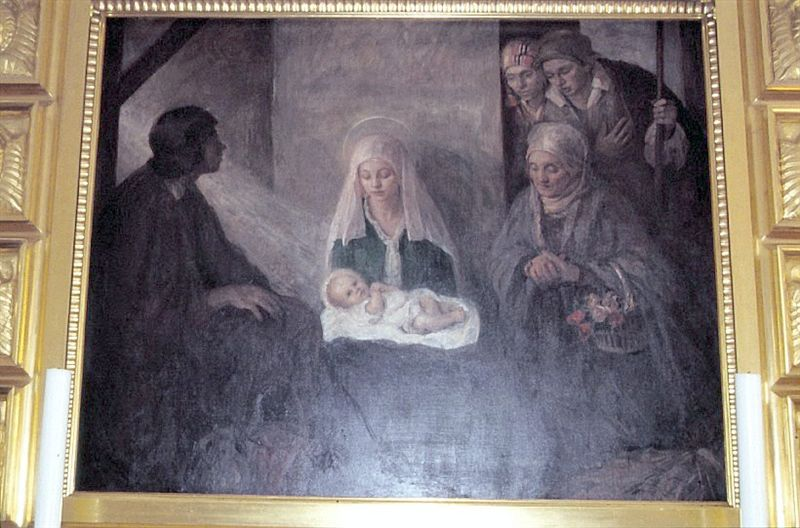 Ollerup Kirke i Danmark. Altertavlemaleri af Bertha Dorph